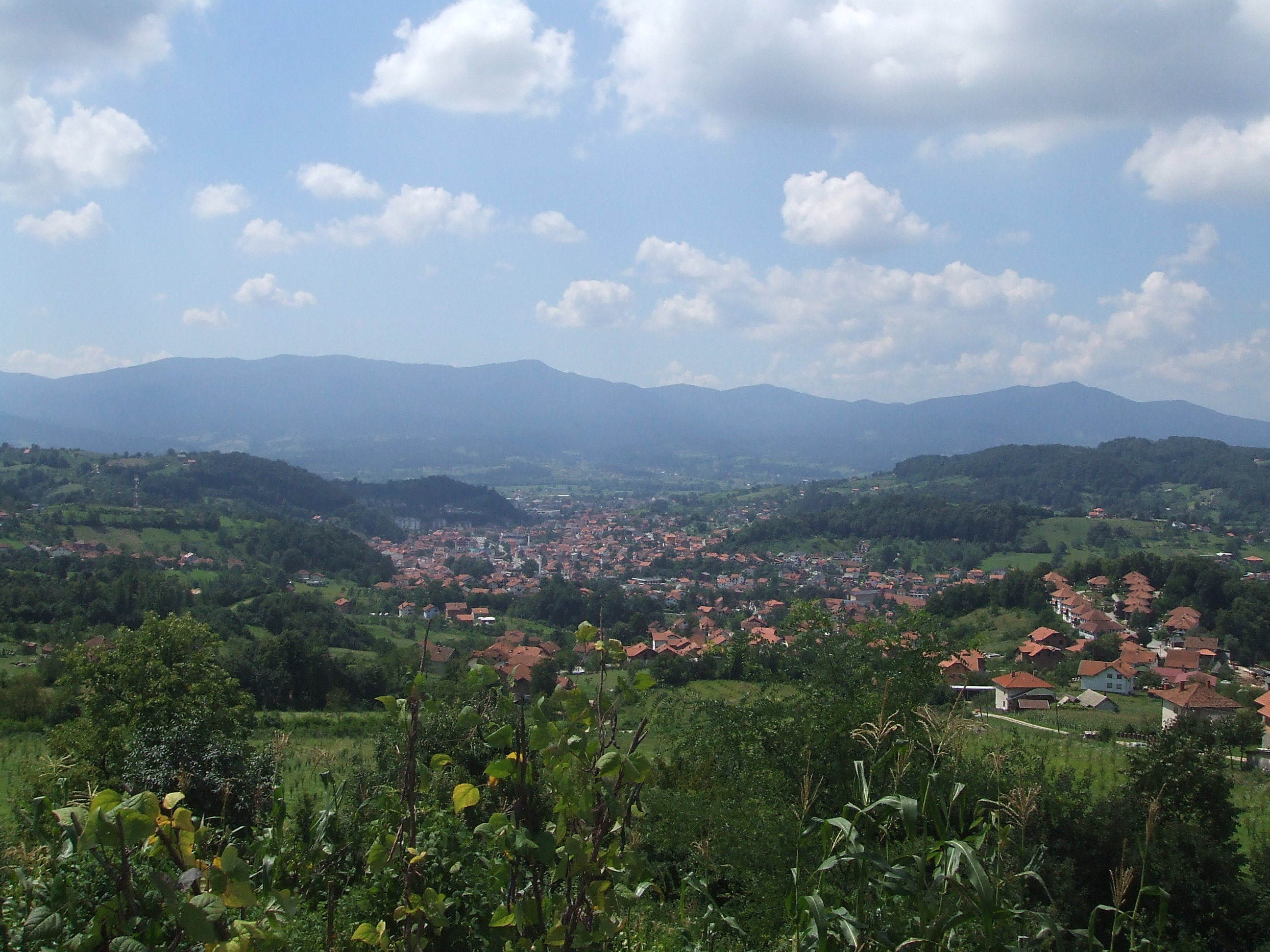 Panorama Gračanice